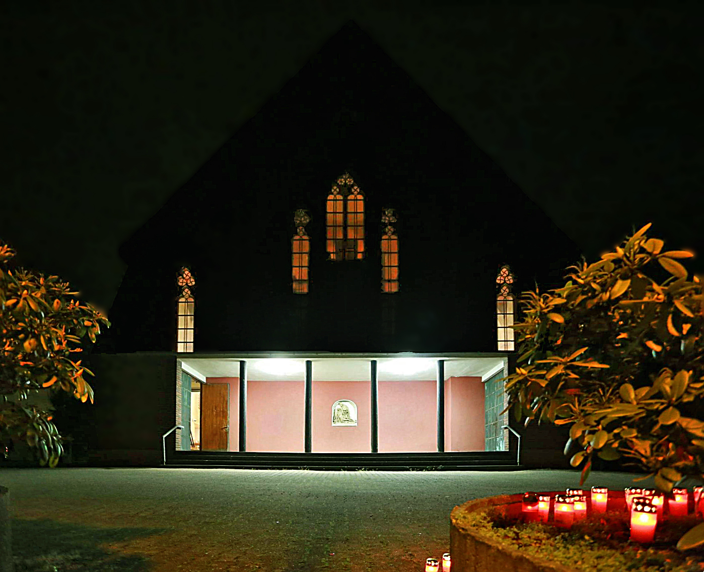 Grablichter vor der ehemaligen Pfarrkirche St. Josef in Essen-Kupferdreh